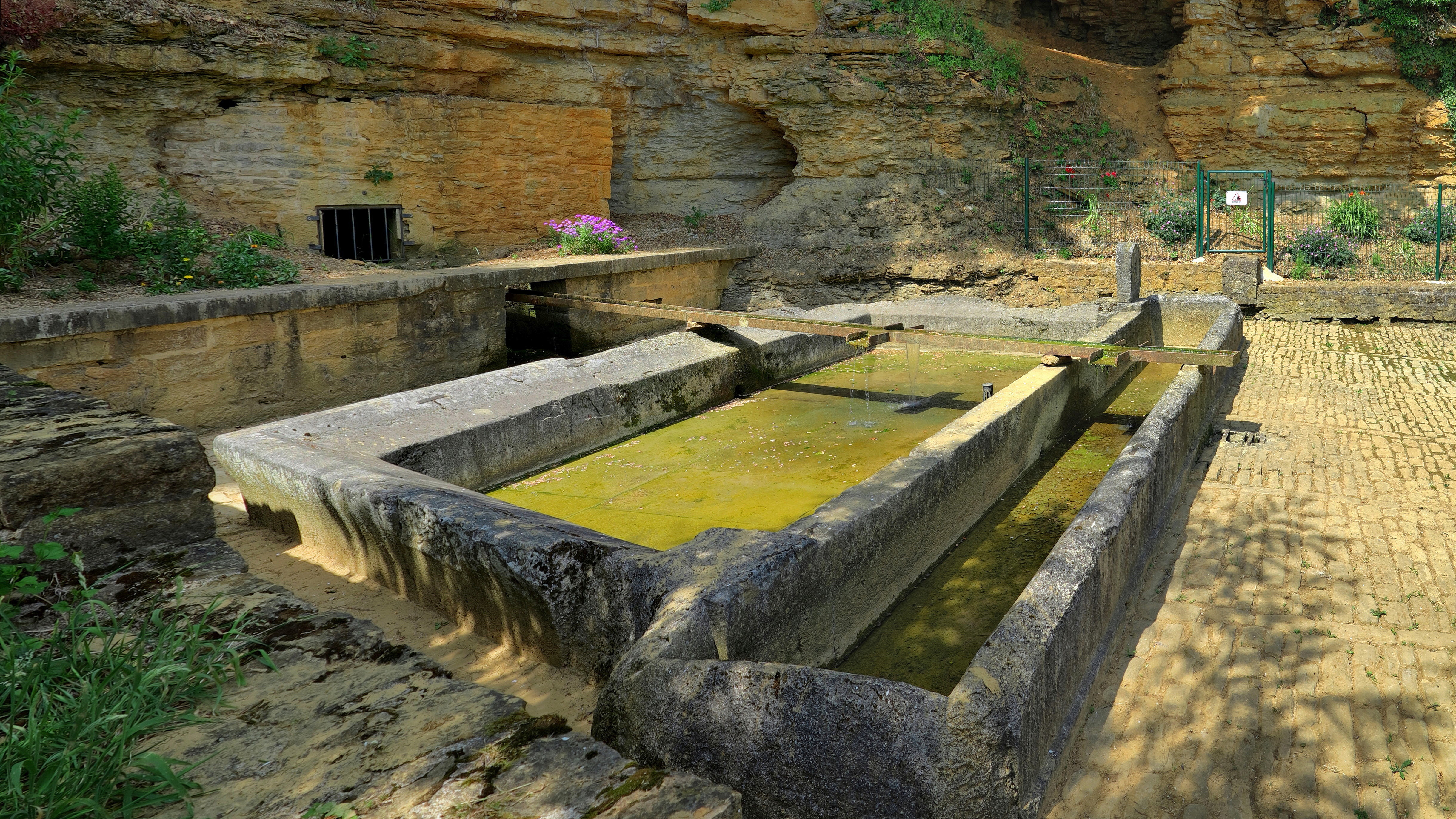 La fontaine-lavoir-abreuvoir d'Audeux